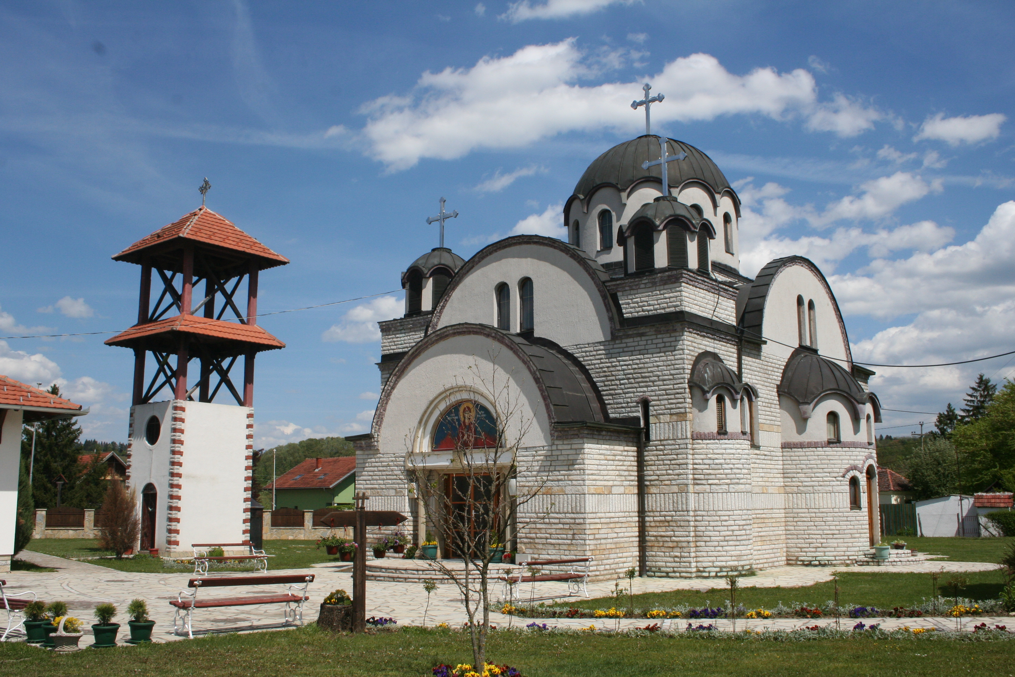 Crkva Svete velikomučenice Marine, Banja Vrujci